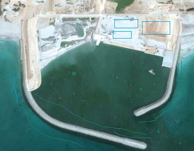 ميناء